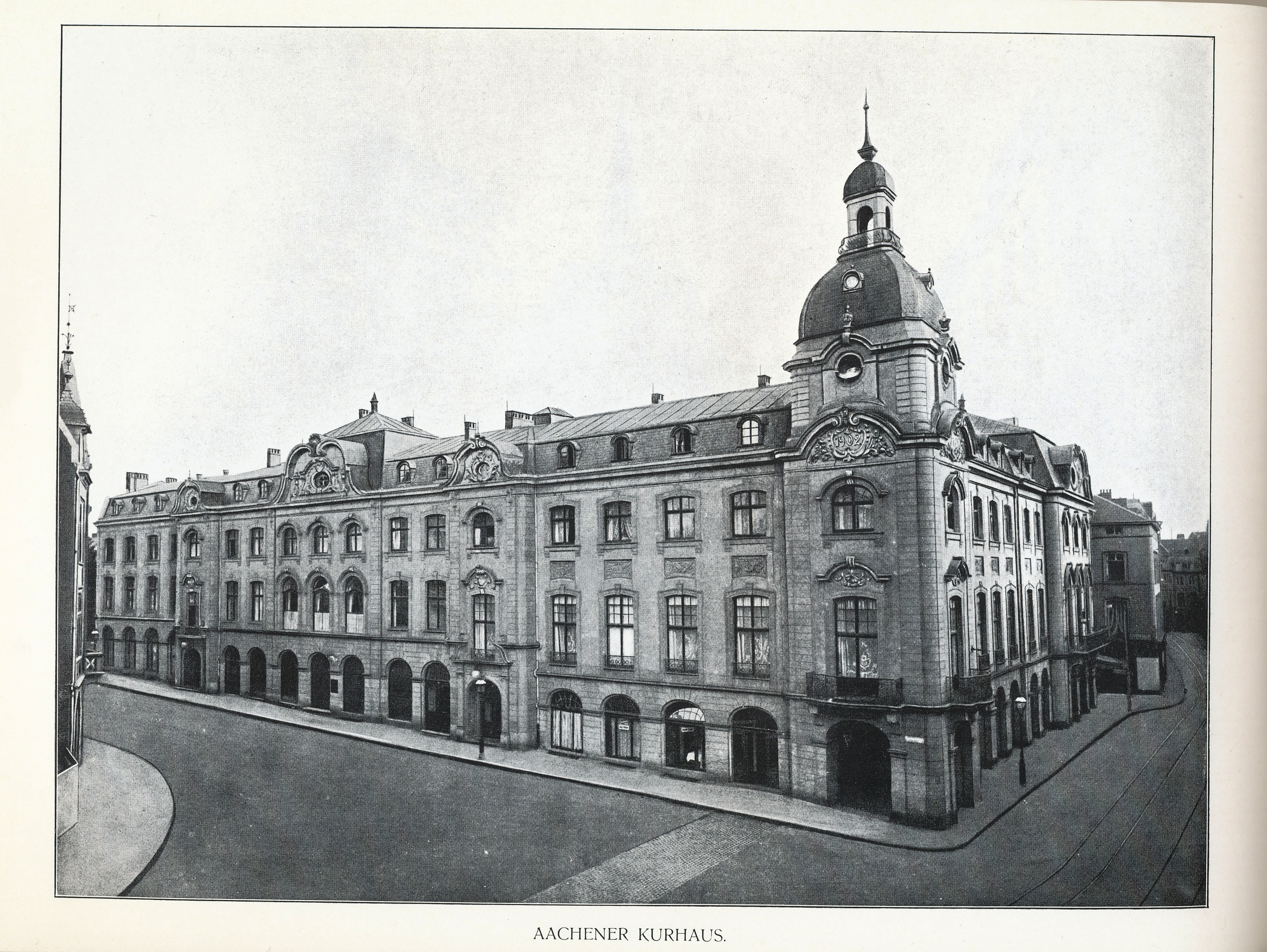 Altes Kurhaus in Aachen nach dem Umbau, um 1905